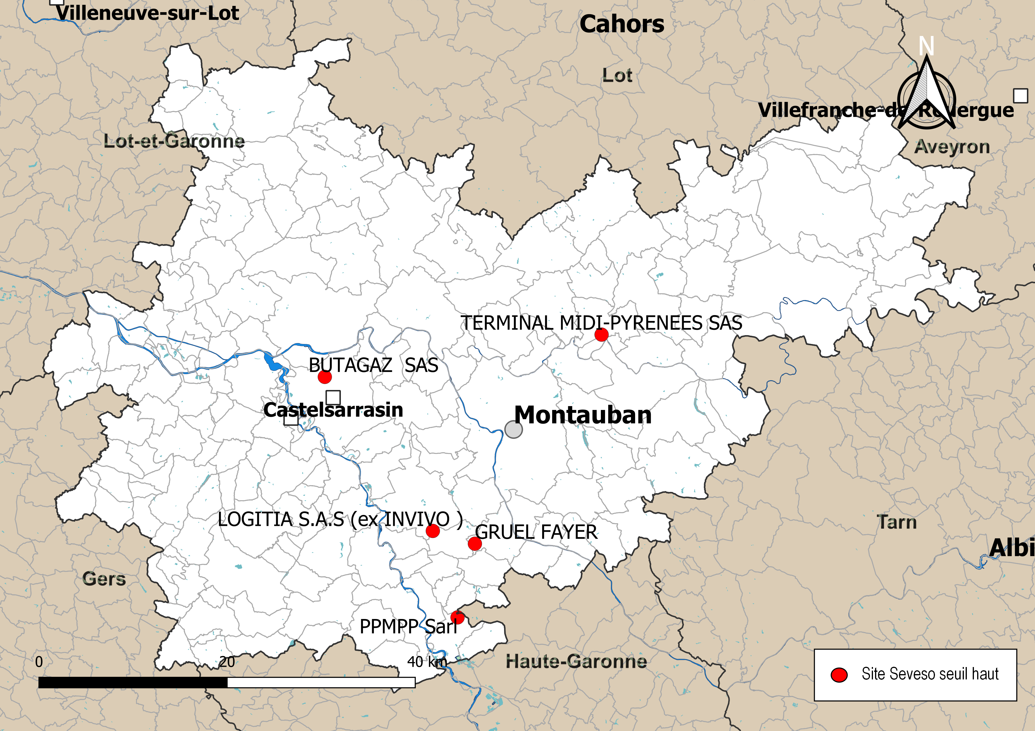 Carte de localisation des sites Seveso seuil haut dans le département de Tarn-et-Garonne (Occitanie, France). Carte arrêtée au 9 novembre 2019.